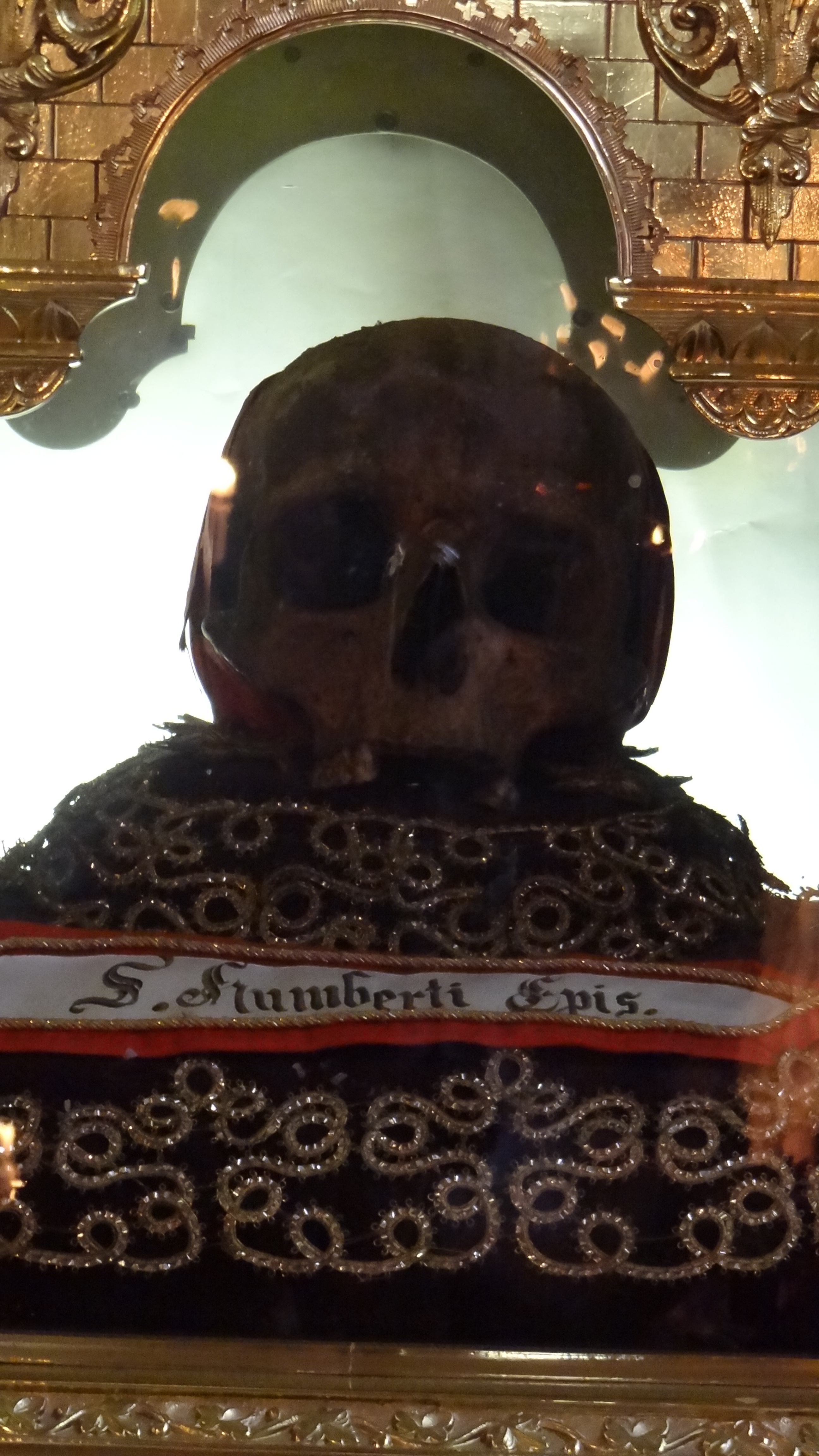 Humbert du Hamel - (659-25 03 682) fondateur de l'Abbaye de Maroilles - relique du crane